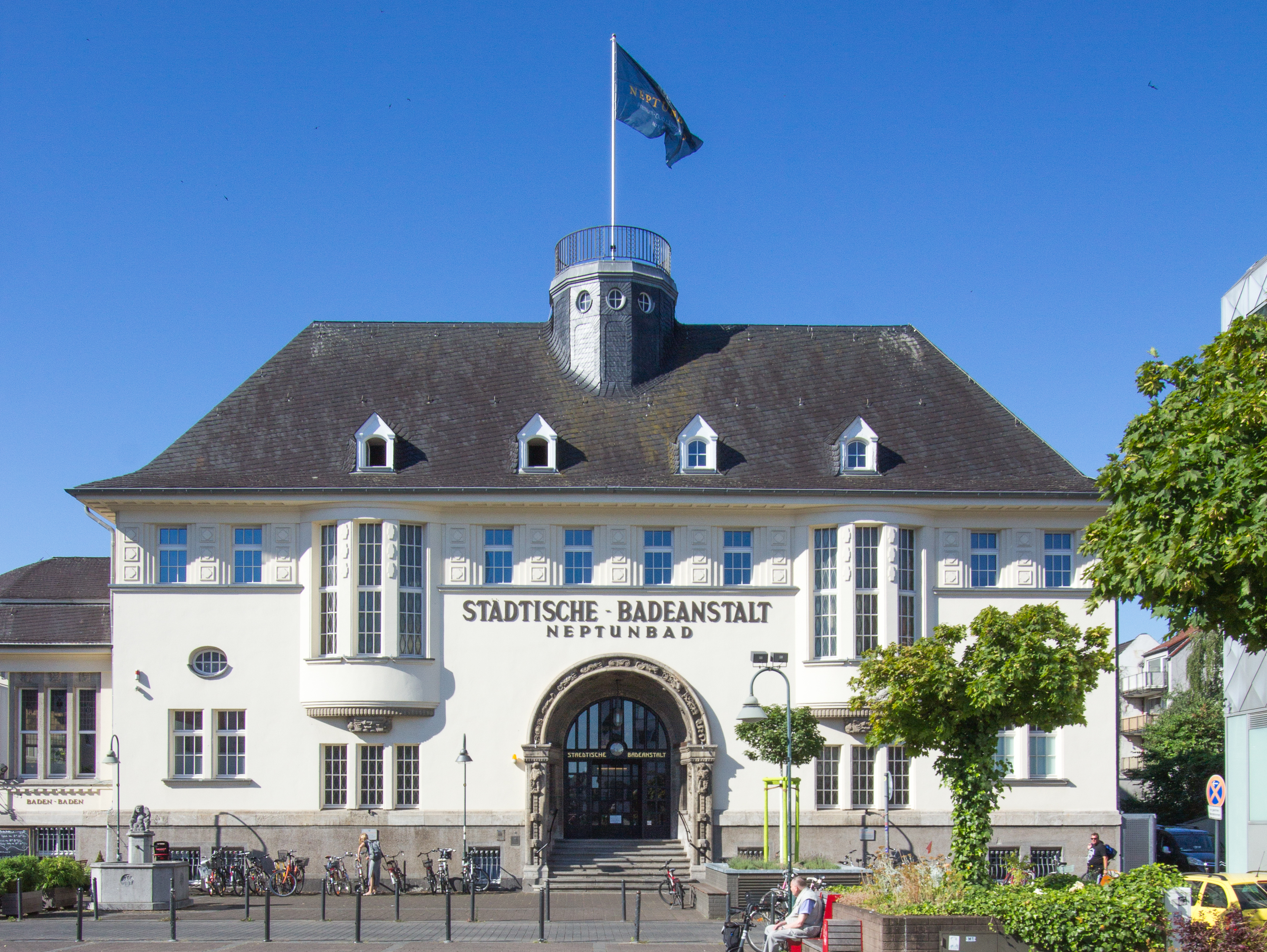 Denkmalgeschütztes Neptunbad, Köln-Ehrenfeld This is a photograph of an architectural monument.